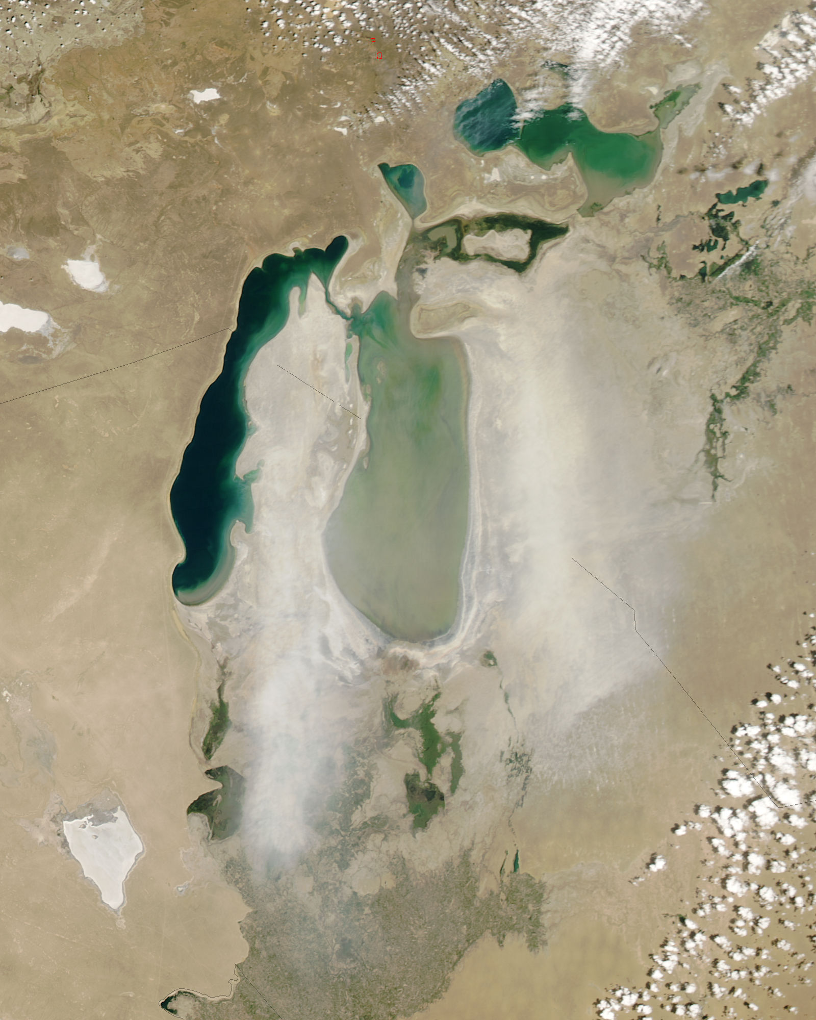 Una immagine del giugno 2006 di ciò che rimane del Lago d'Aral. Si vede chiaramente a Nord il piccolo Aral completamente separato dal grande Aral. La foto riprende una tempesta di sabbia e sale che porta le polveri verso Sud.